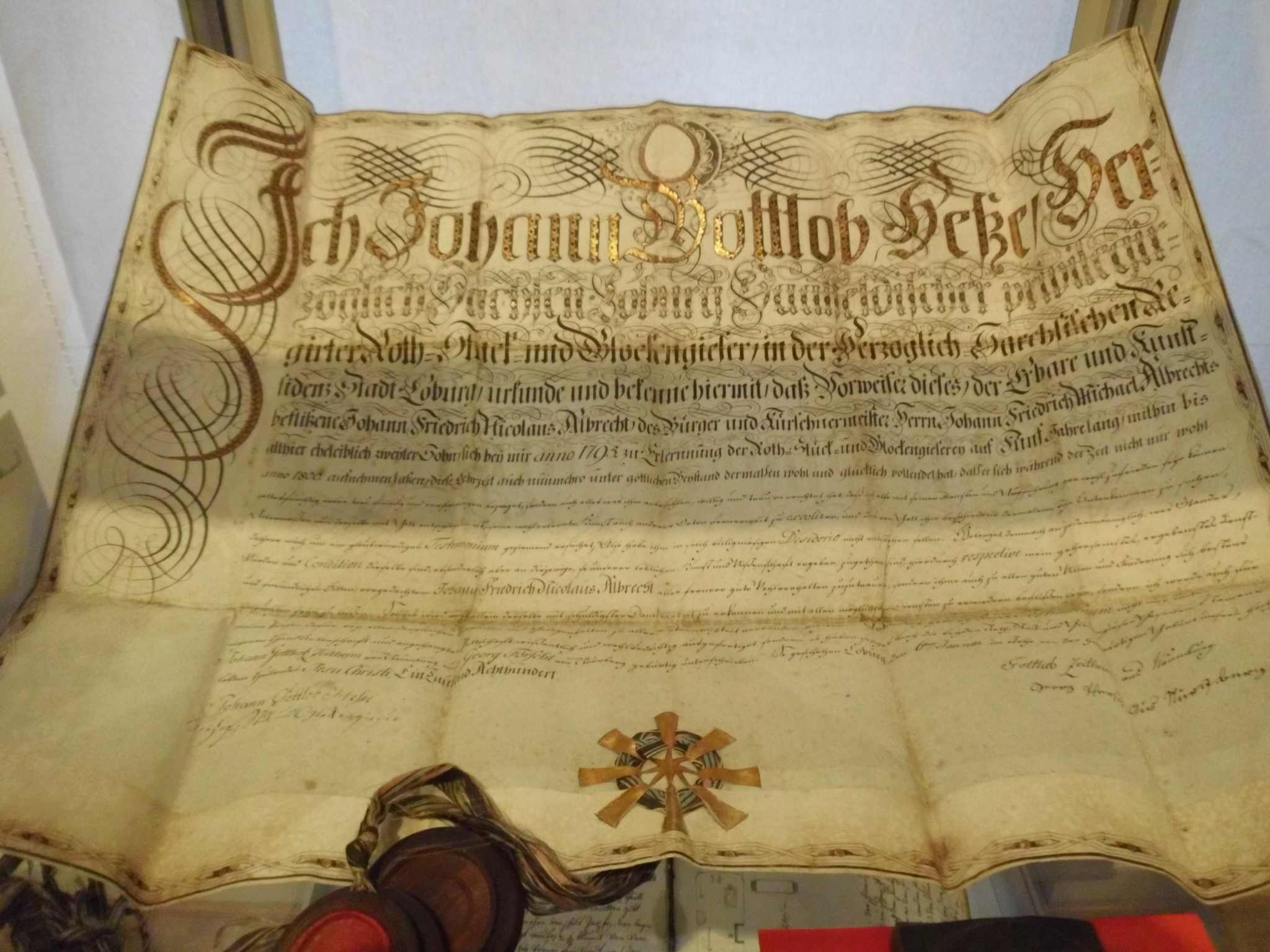 Urkunde in Ausstellung